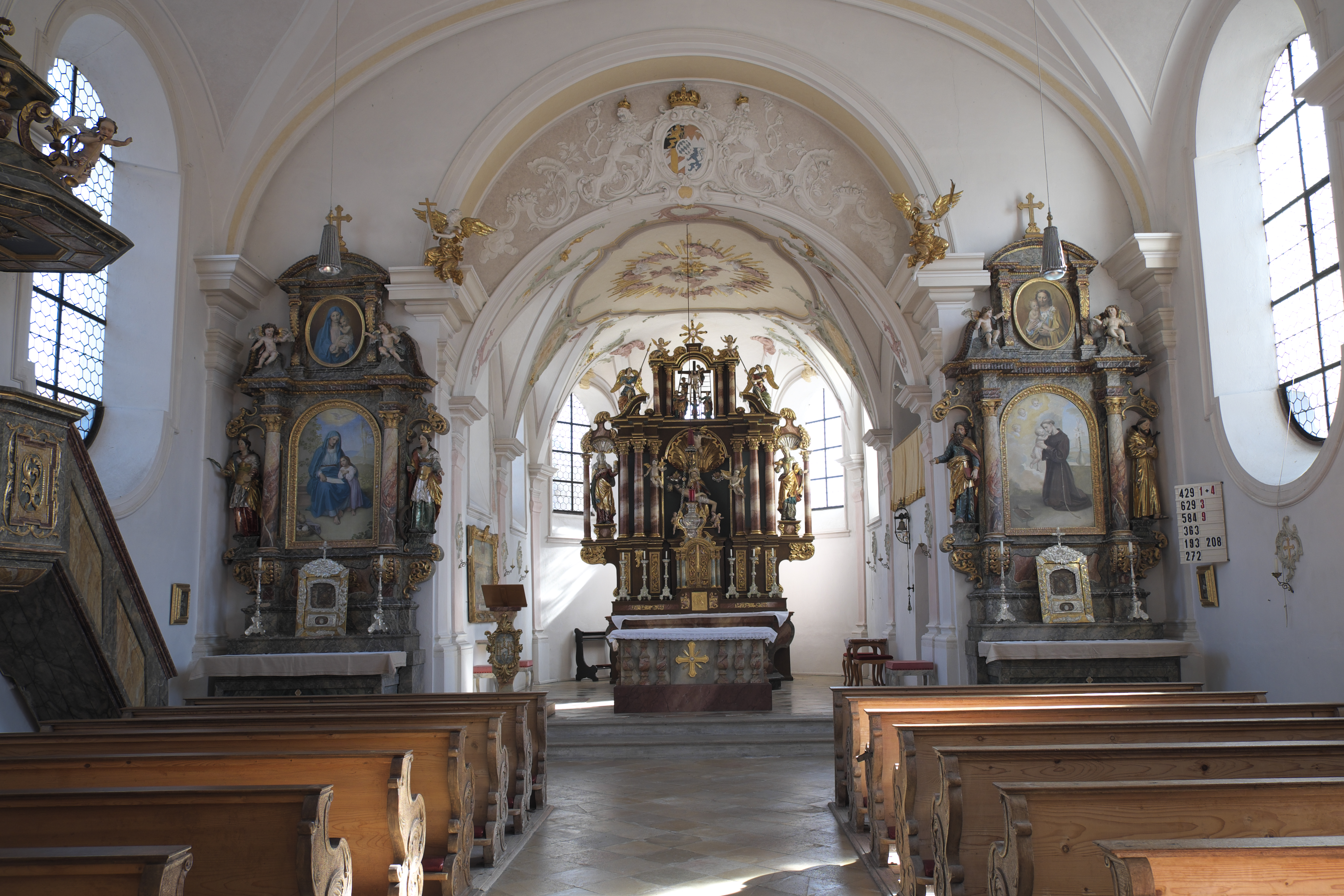 Katholische Filialkirche St. Maria, ehemalige Wallfahrtskirche, in St. Heinrich, einem Ortsteil von Münsing im Landkreis Bad Tölz-Wolfratshausen (Bayern/Deutschland), Innenraum